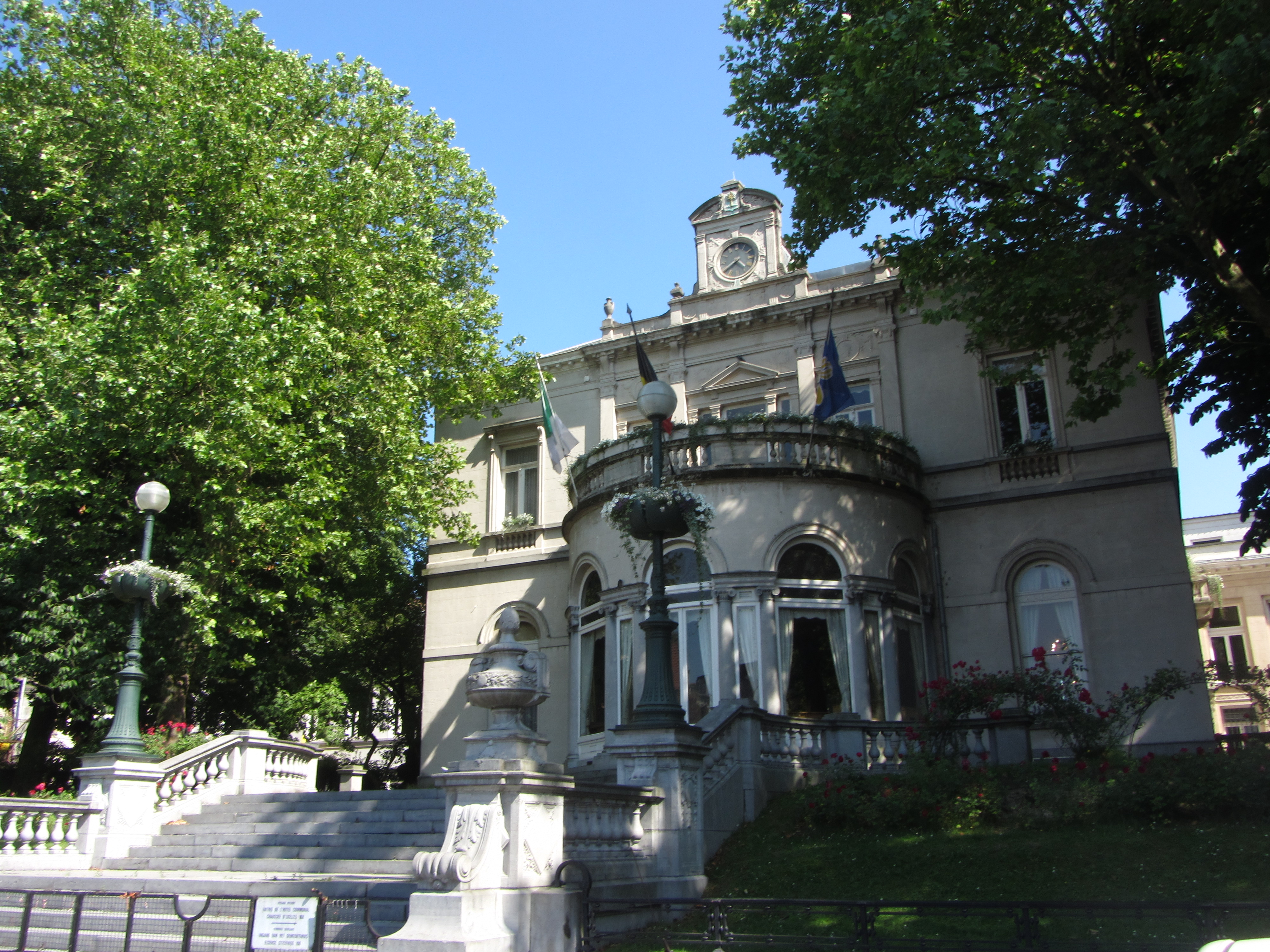 Maison communale d'Ixelles ou Hôtel Malibran